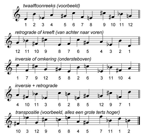 Dodecafonie_example